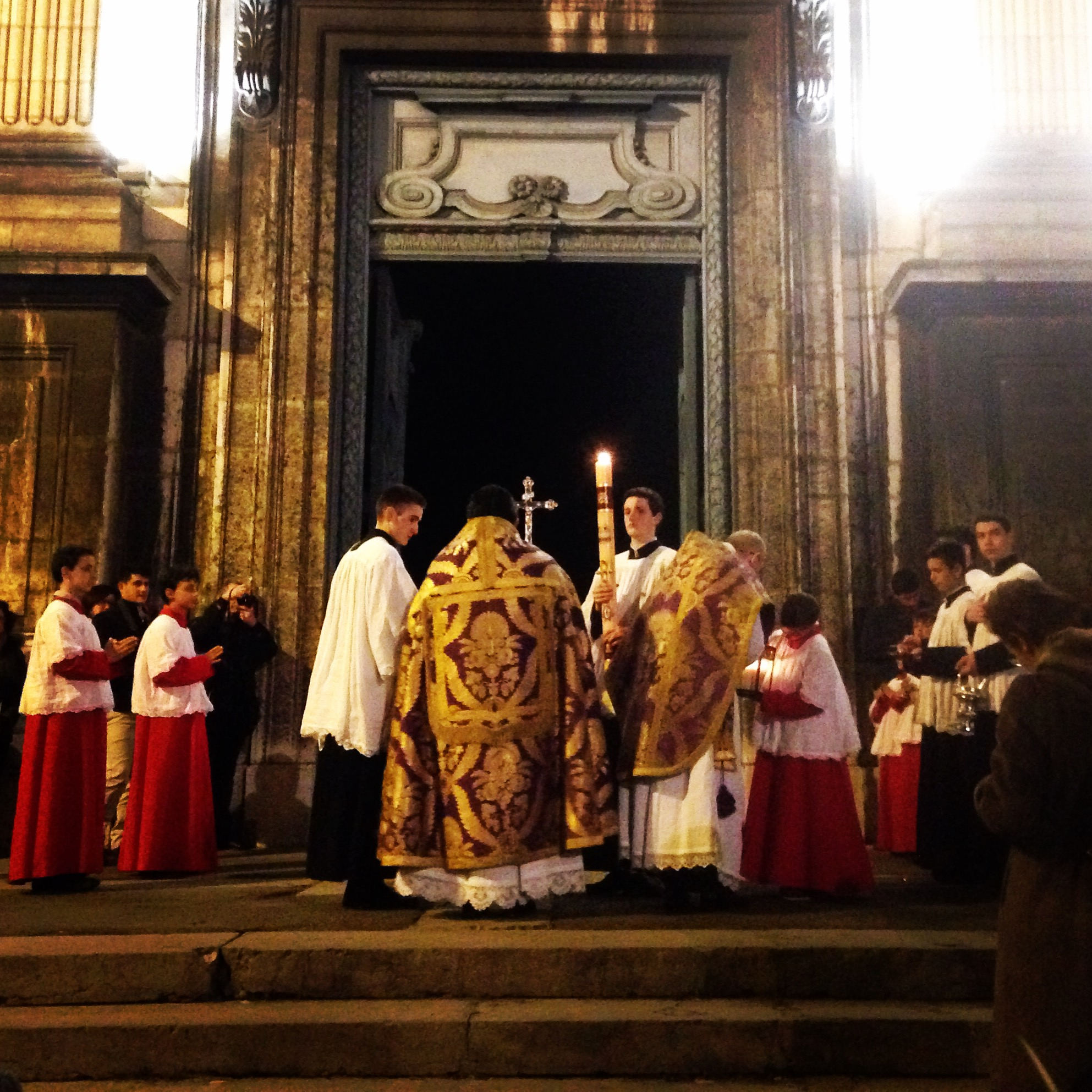 liturgie de la FSSP accordée par benoit XVI